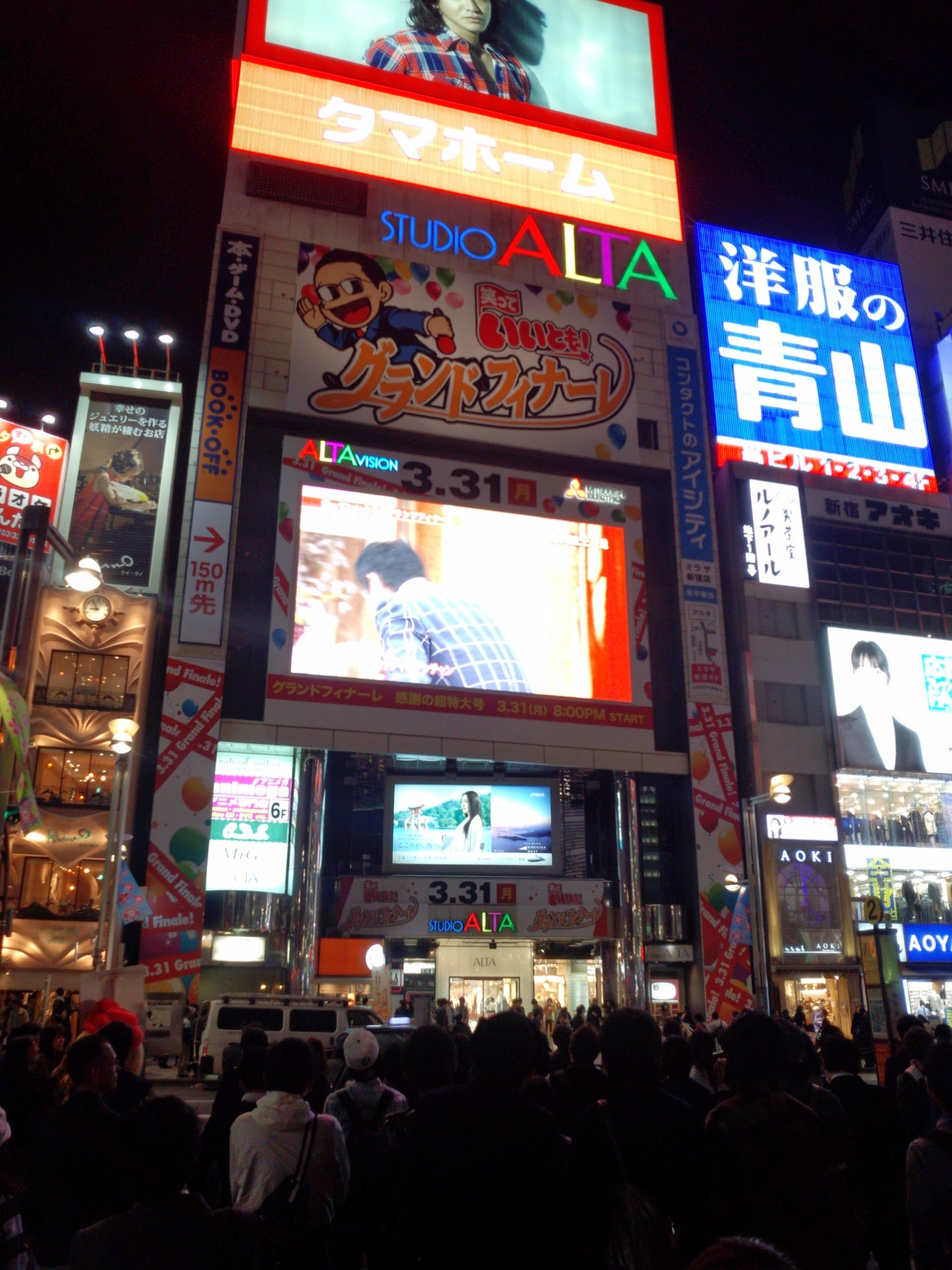 2014年3月31日午後9時ごろ(JST)、新宿アルタ前にて“森田一義アワー 笑っていいとも! グランドフィナーレ 感謝の超特大号”の放送の様子を眺める人たち